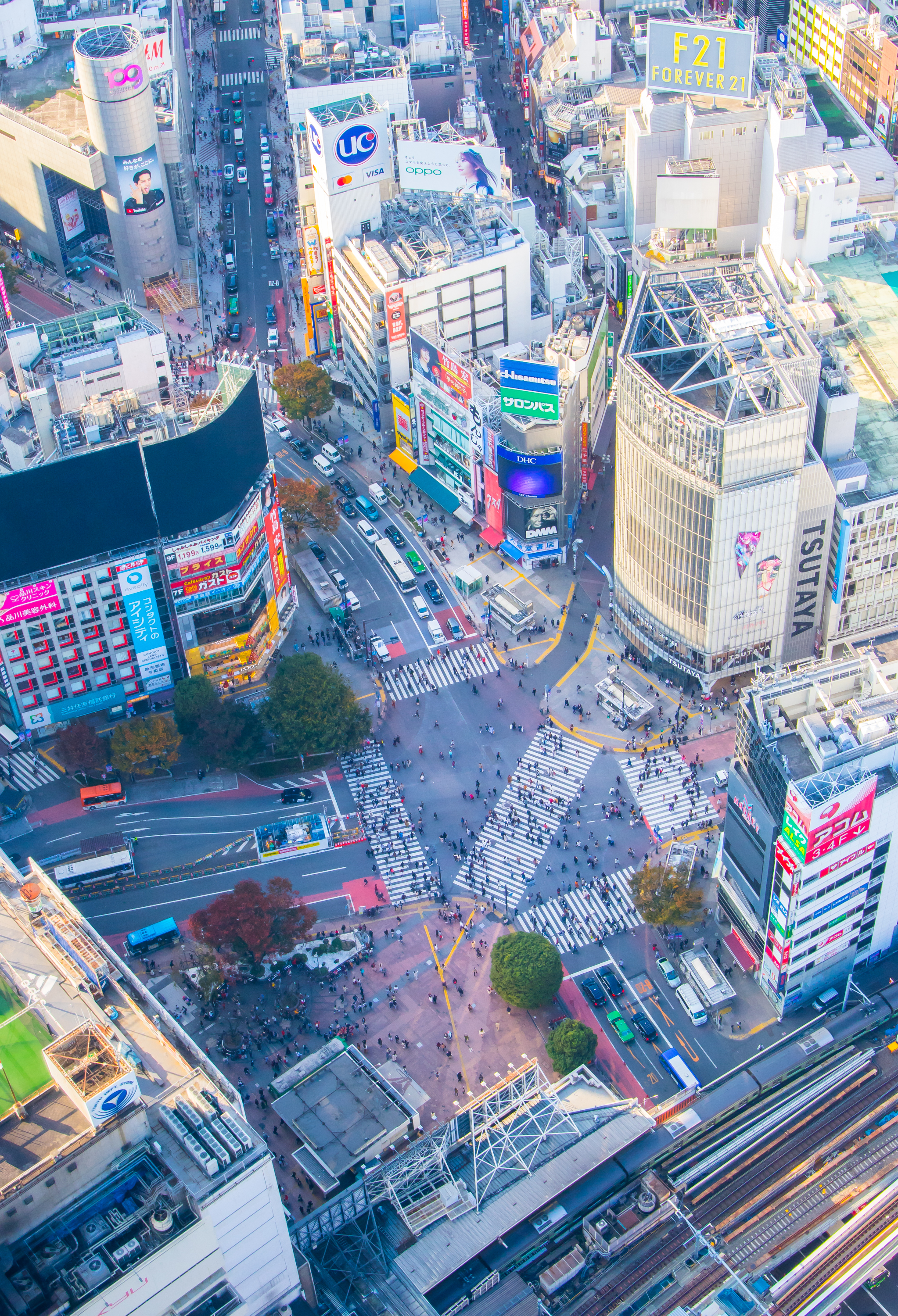 渋谷スクランブル交差点。渋谷スクランブルスクエア、46階屋内展望回廊「SHIBUYA SKY - SKY GALLERY」より。